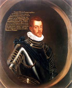 Auersperg, Andrej, grof (1557–1593) Vrhovni poveljnik Vojne krajine (imenovan tudi Andrej Turjaški)